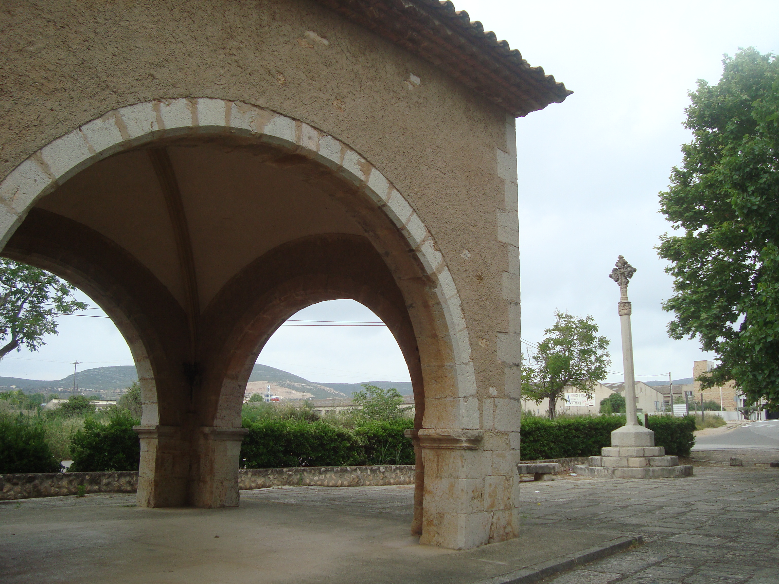 Ermita de la Mare de Déu de Loreto (Ulldecona)